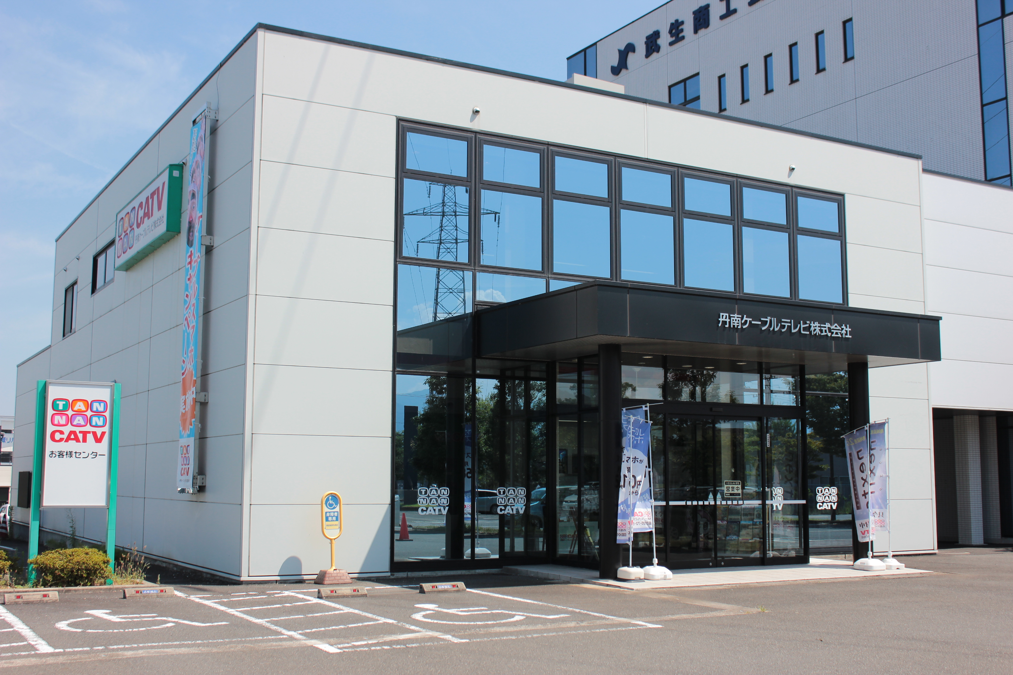 丹南ケーブルテレビ本社・たけふスタジオ（福井県越前市） Canon EOS Kiss X5